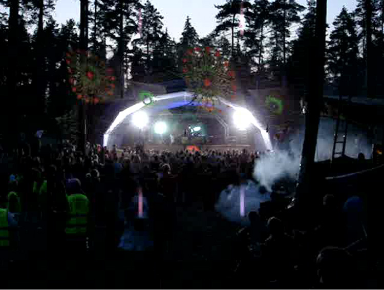 Konemetsä open air forest festival, 2006 in Finland.